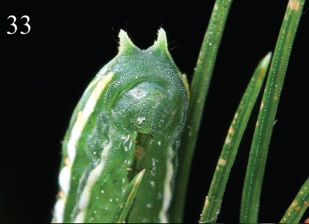 Parasa pygmy